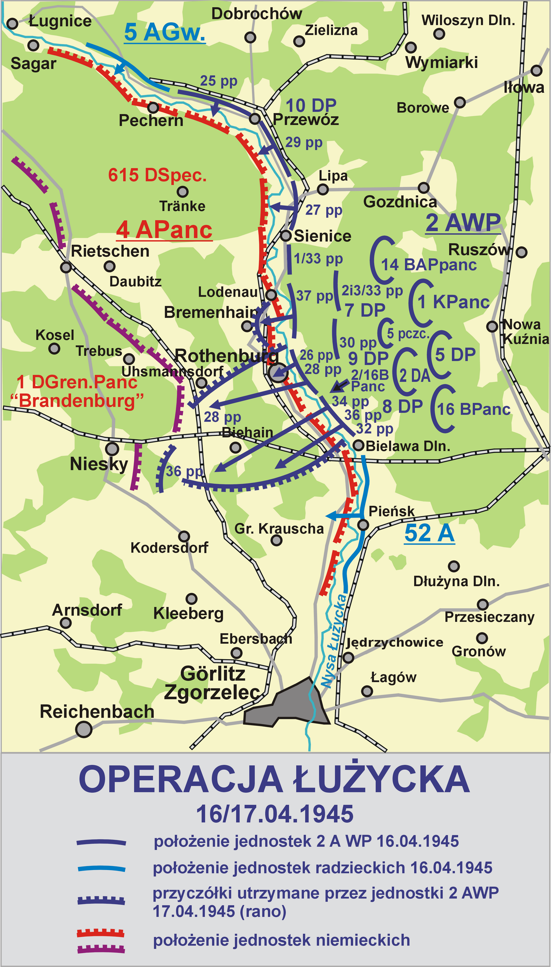 Operacja łużycka 16/17.04.1945